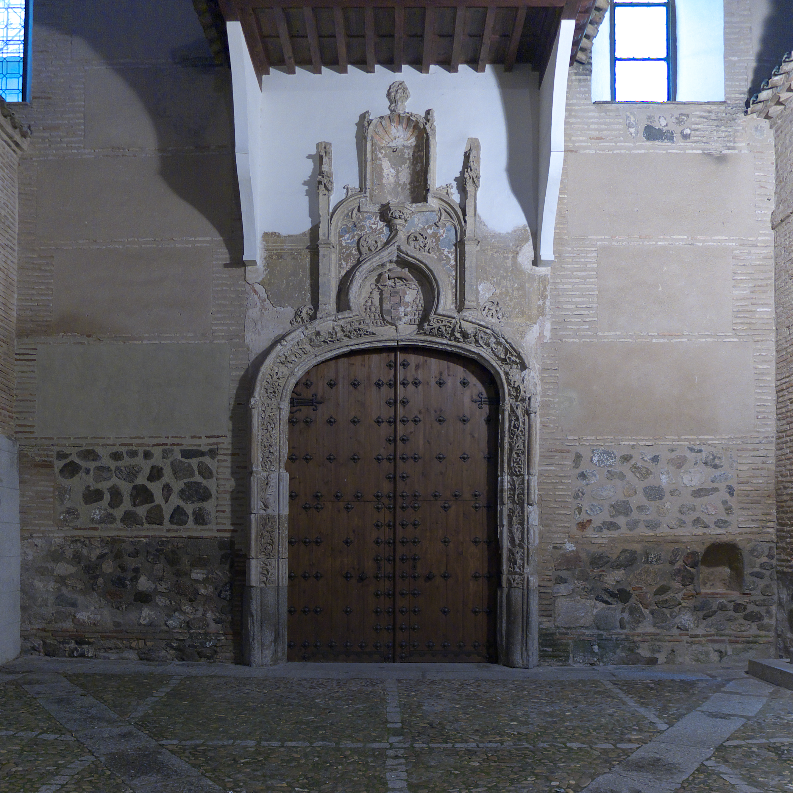 Portada de Pedro Gumiel (s. XV)